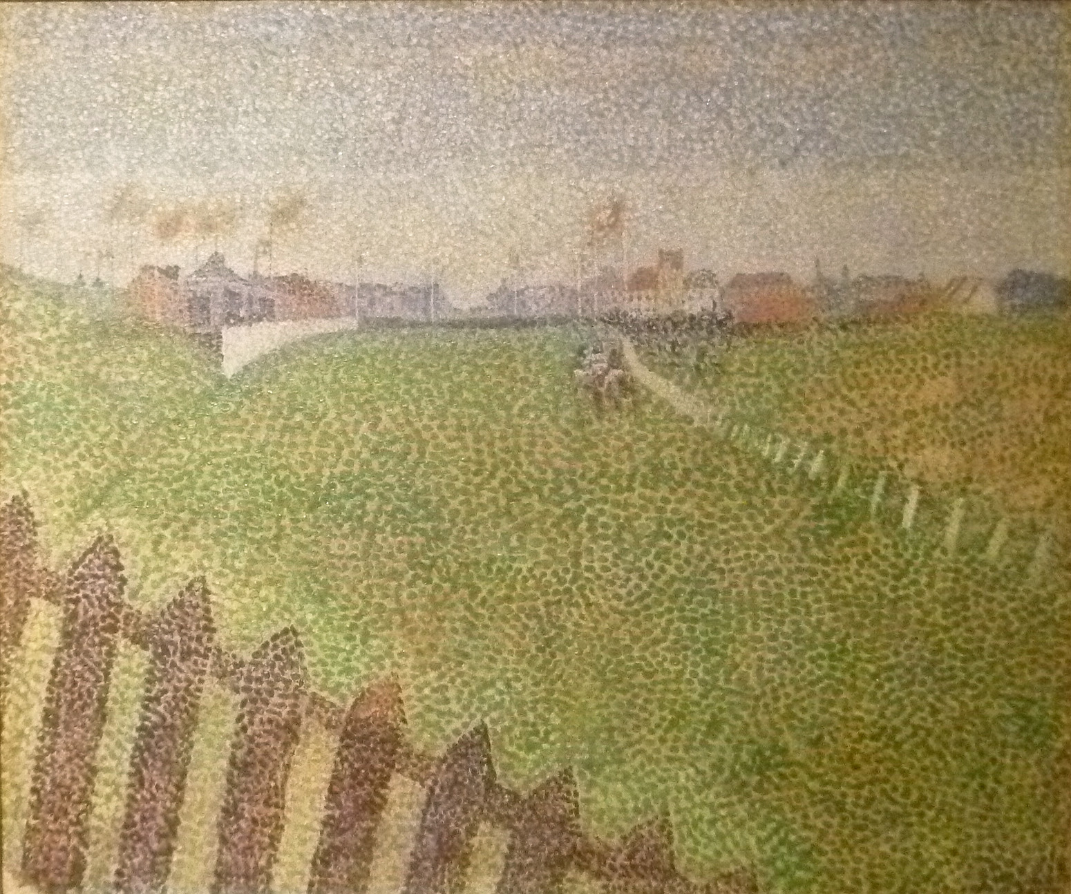 "De Wellingtonrenbaan te Oostende" (1888) olieverf op doek door Willy Finch (1854-1930); Ateneum Art Museum, Finnish National Gallery, Helsinki